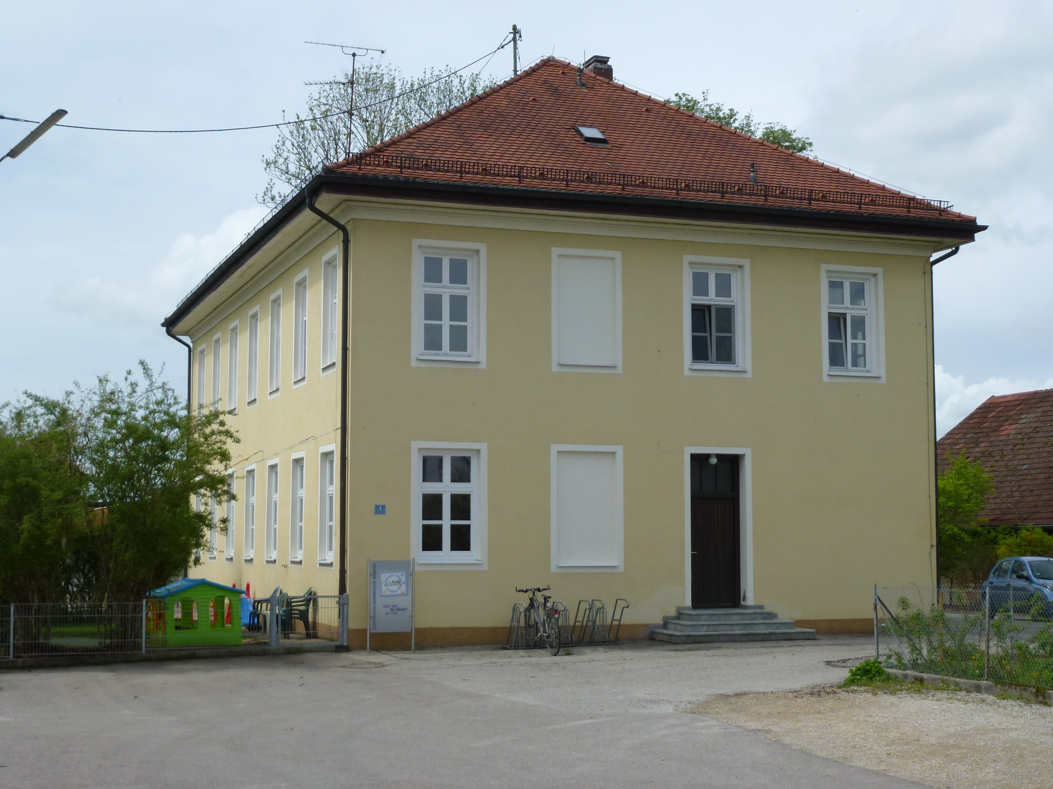 Arnbach (Gde Schwabhausen)Klosterweg1: Ehem Schloß, heute Kindergarten